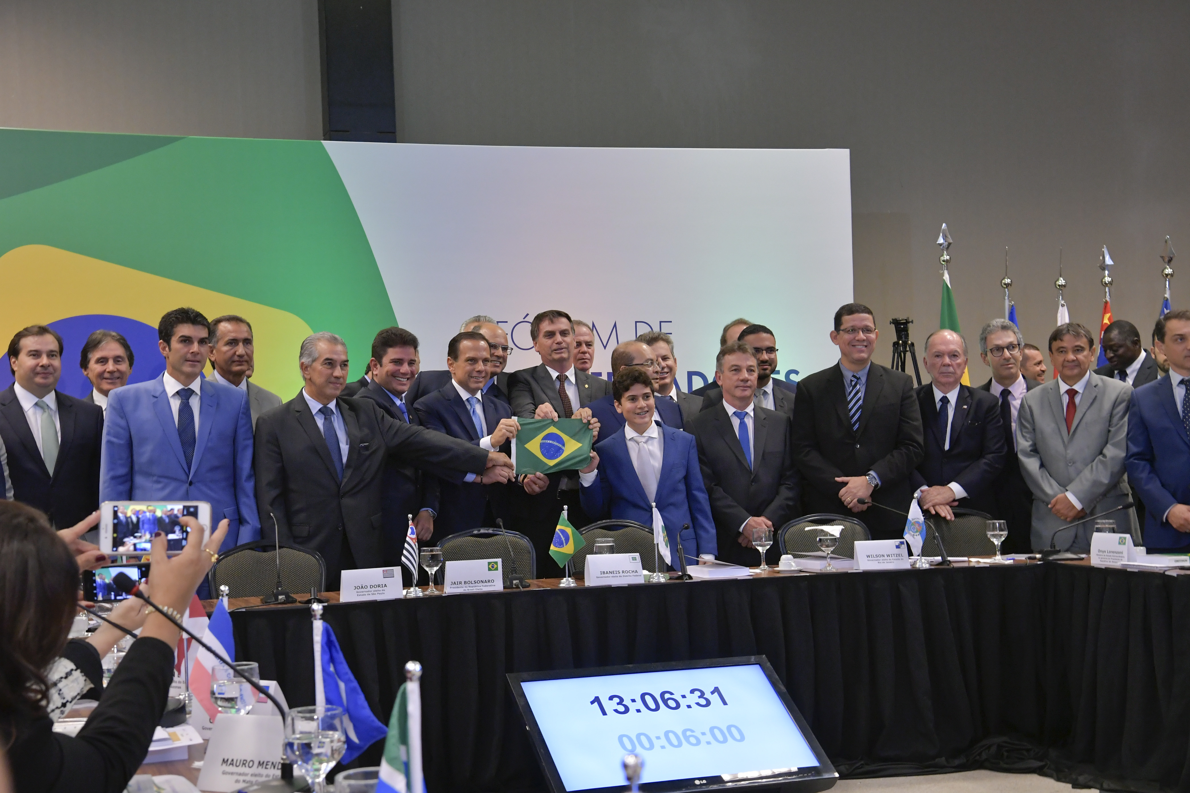 Foto contendo diversos participantes do Fórum dos Governadores de 2018.